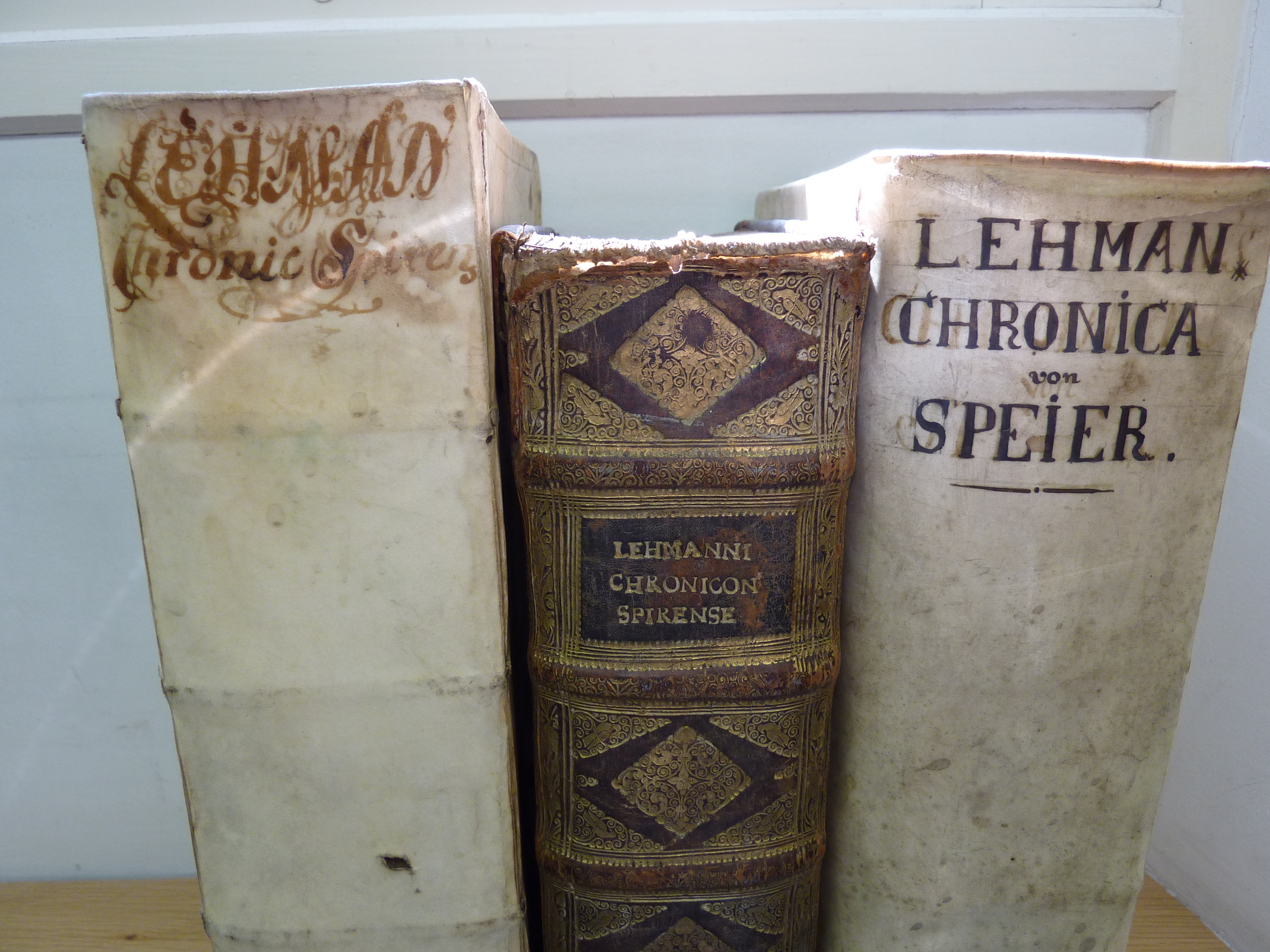 Aus dem Bestand der Bibliothek de DHIP: Christoph Lehmann, Chronica der Freyen Reichs-Stadt Speier, 1. Auflage 1612 [links], 3. Auflage 1698 [Mitte] und 4. Auflage 1711 [rechts].